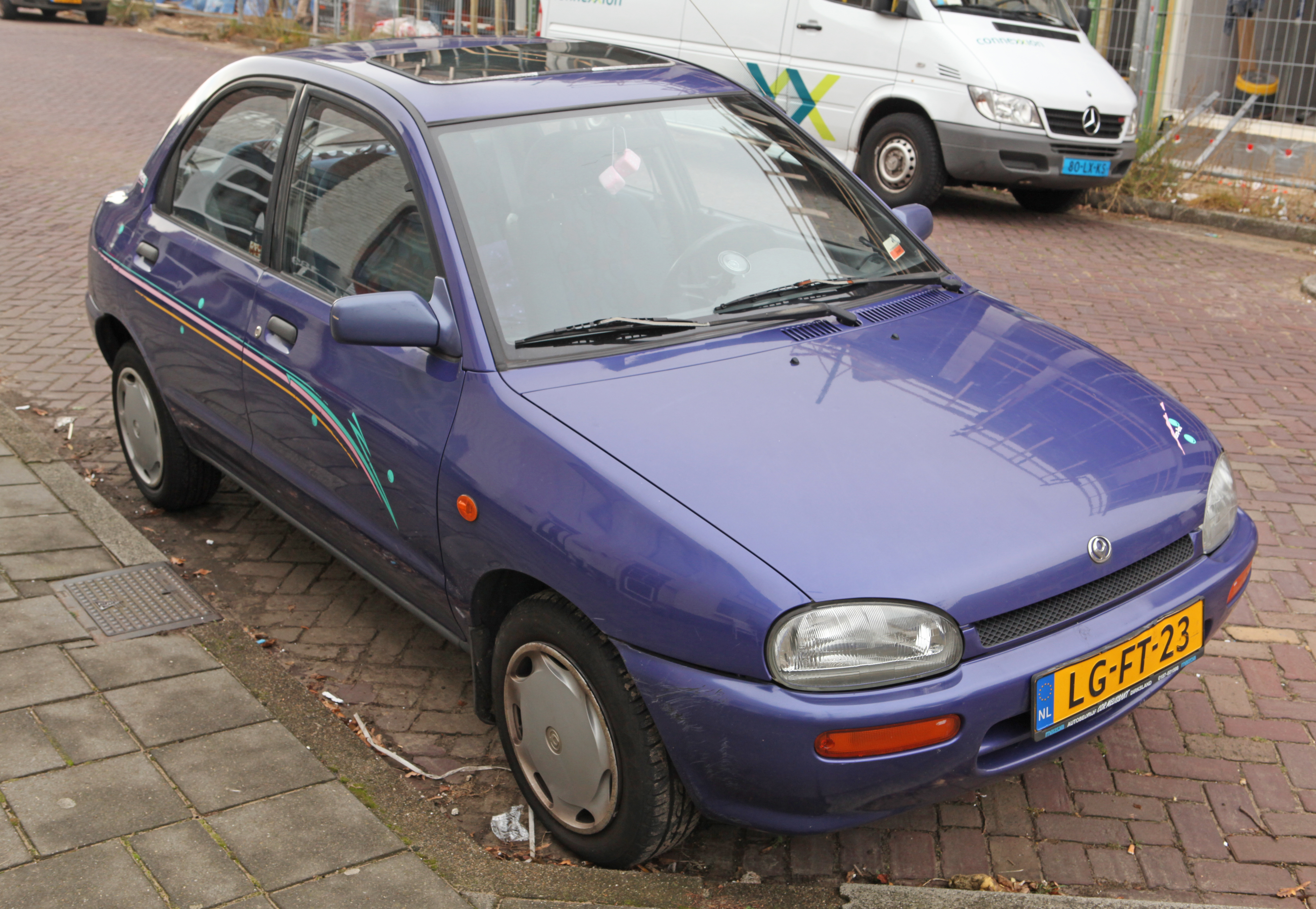 1995 Mazda 121 1.3 I Yes !